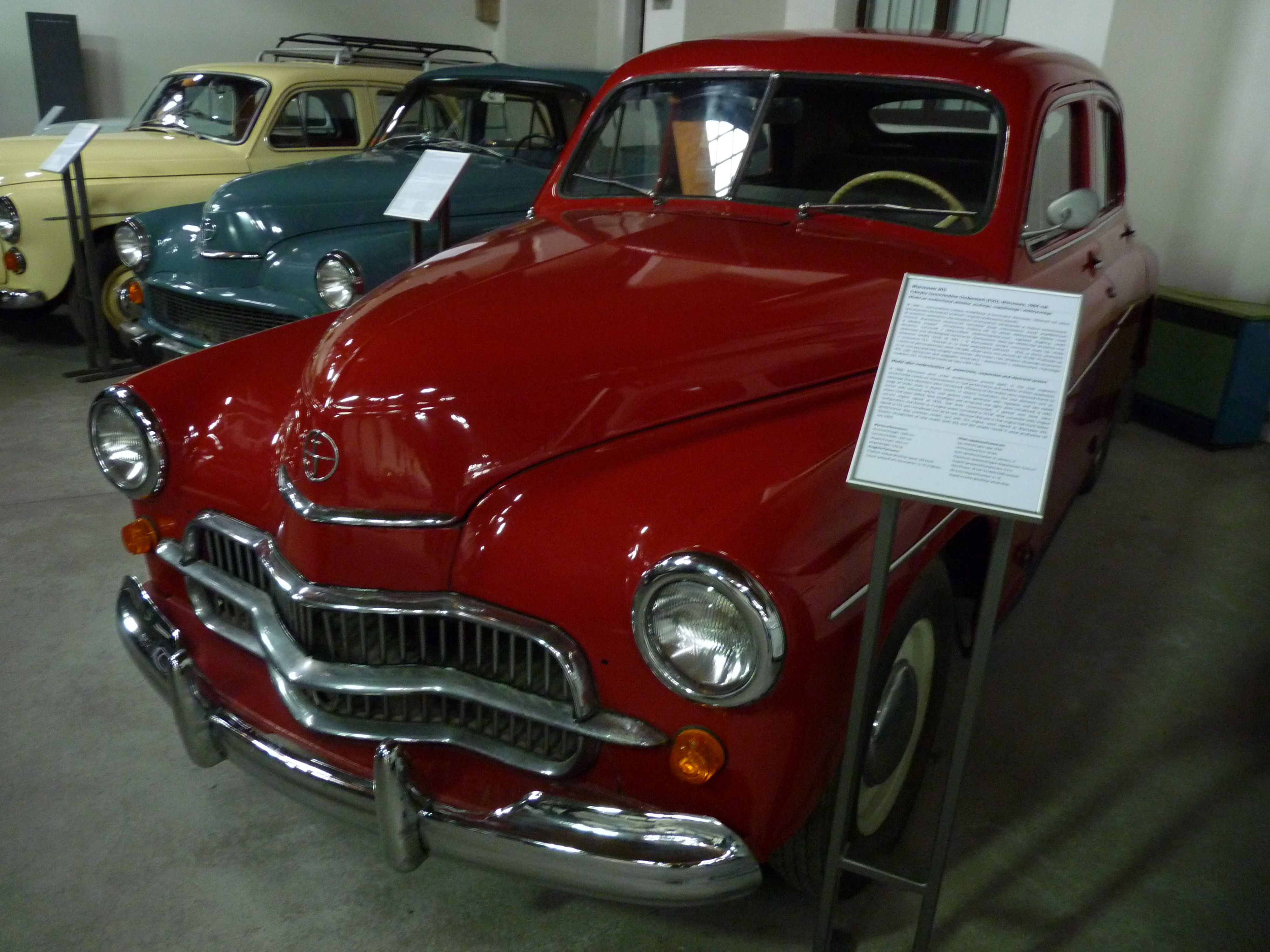 FSO Warszawa 201 at Muzeum Inżynierii Miejskiej in Kraków